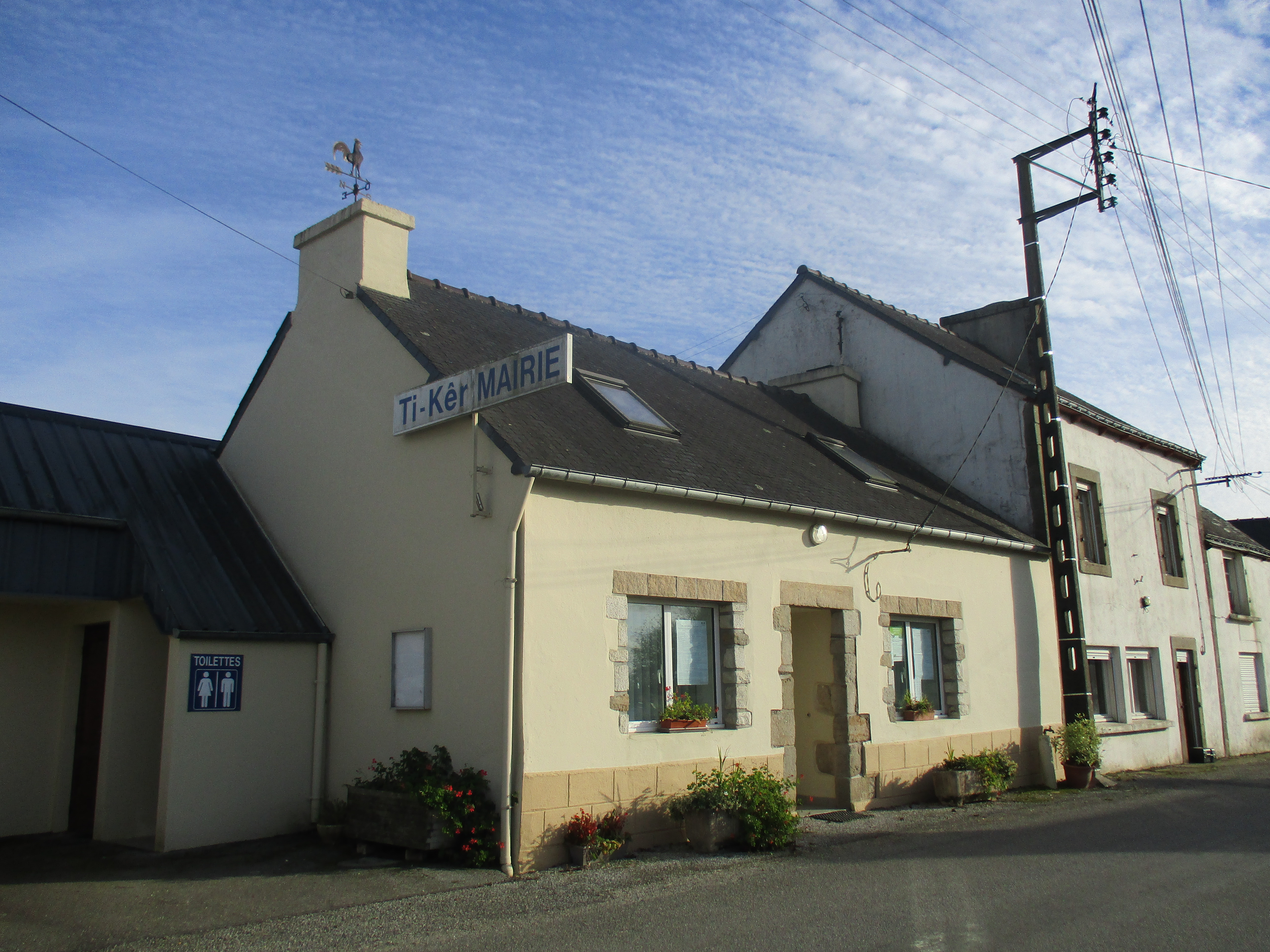 La mairie de Tréogan